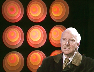 Portrait de Gregorio Vardanega